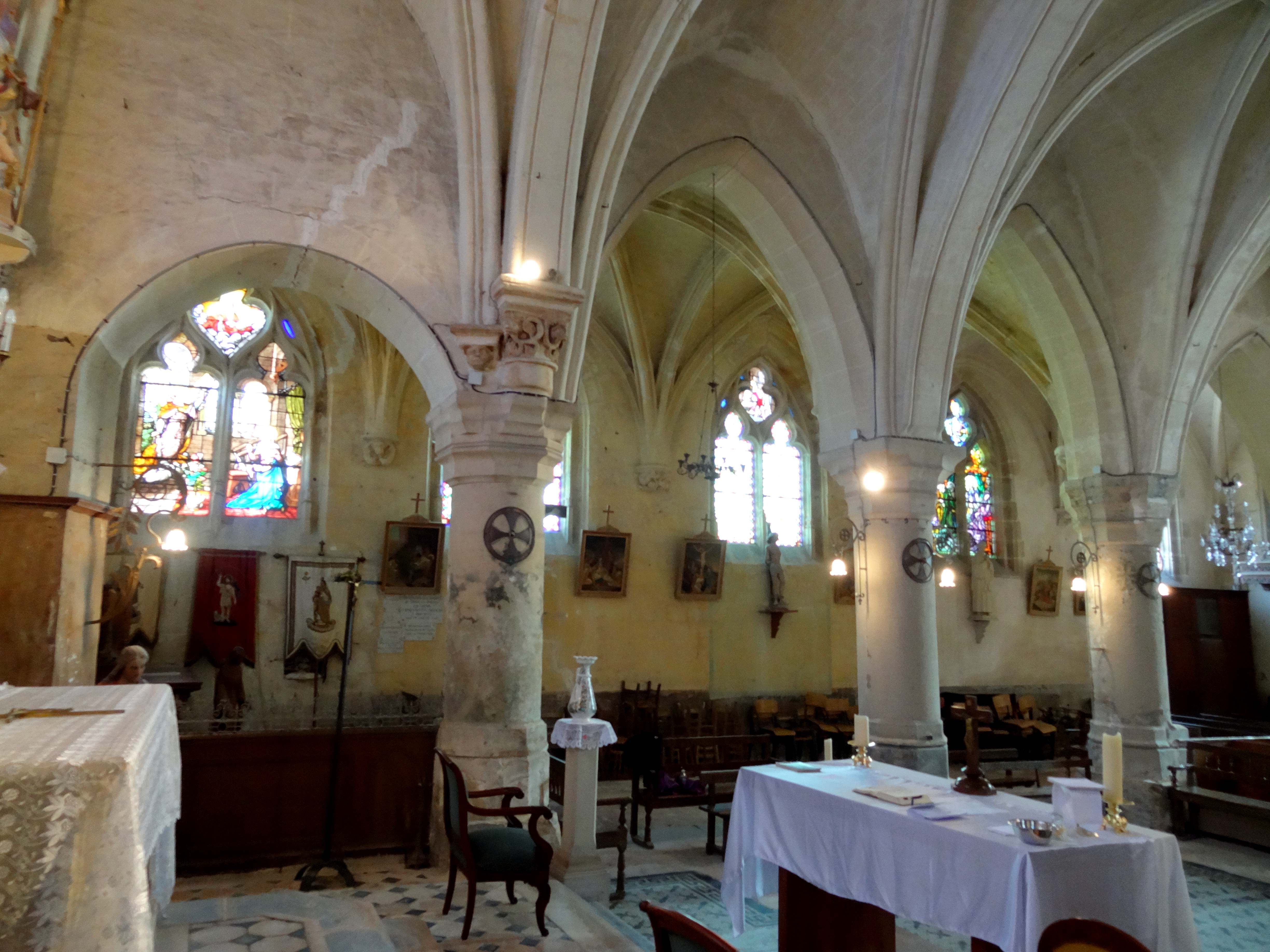 Intérieur de l'église - voir titre.